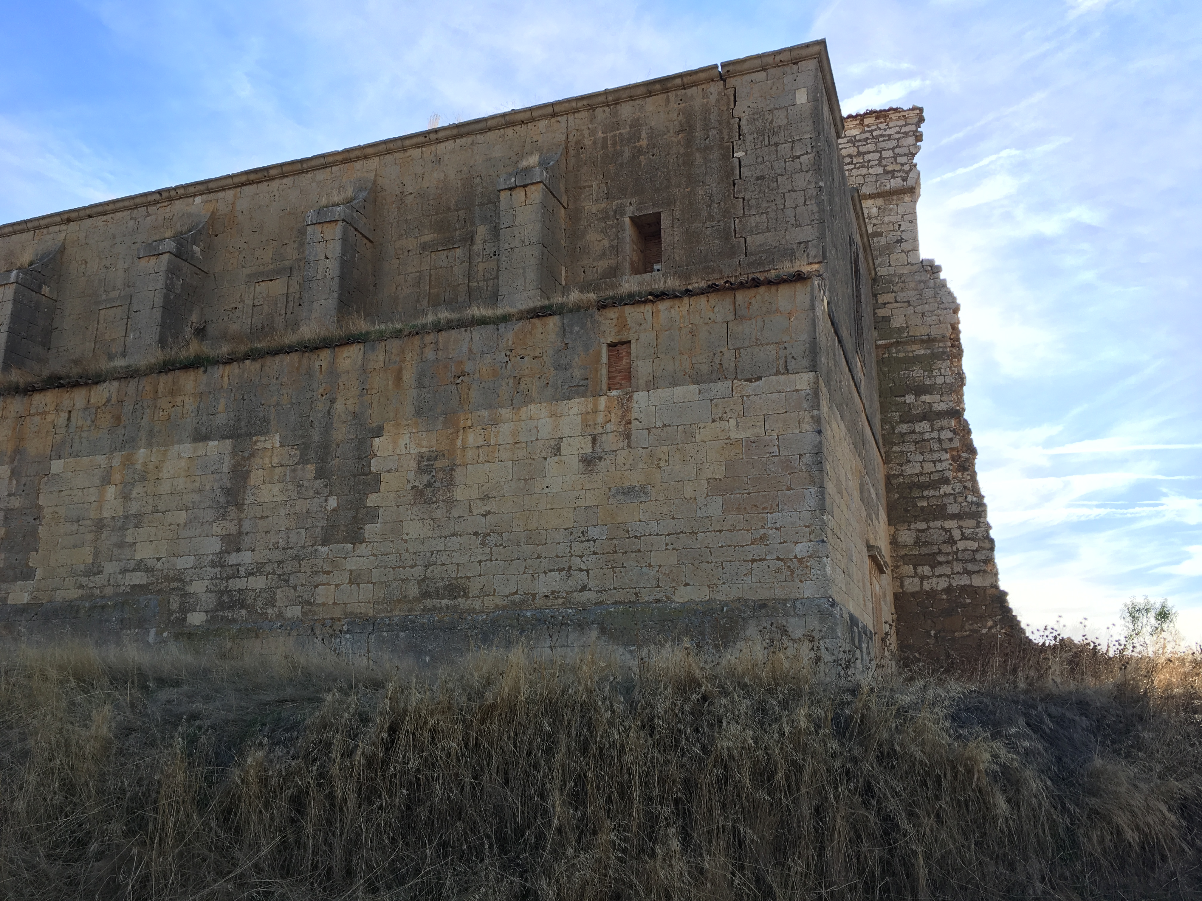 Villaesper Milenario